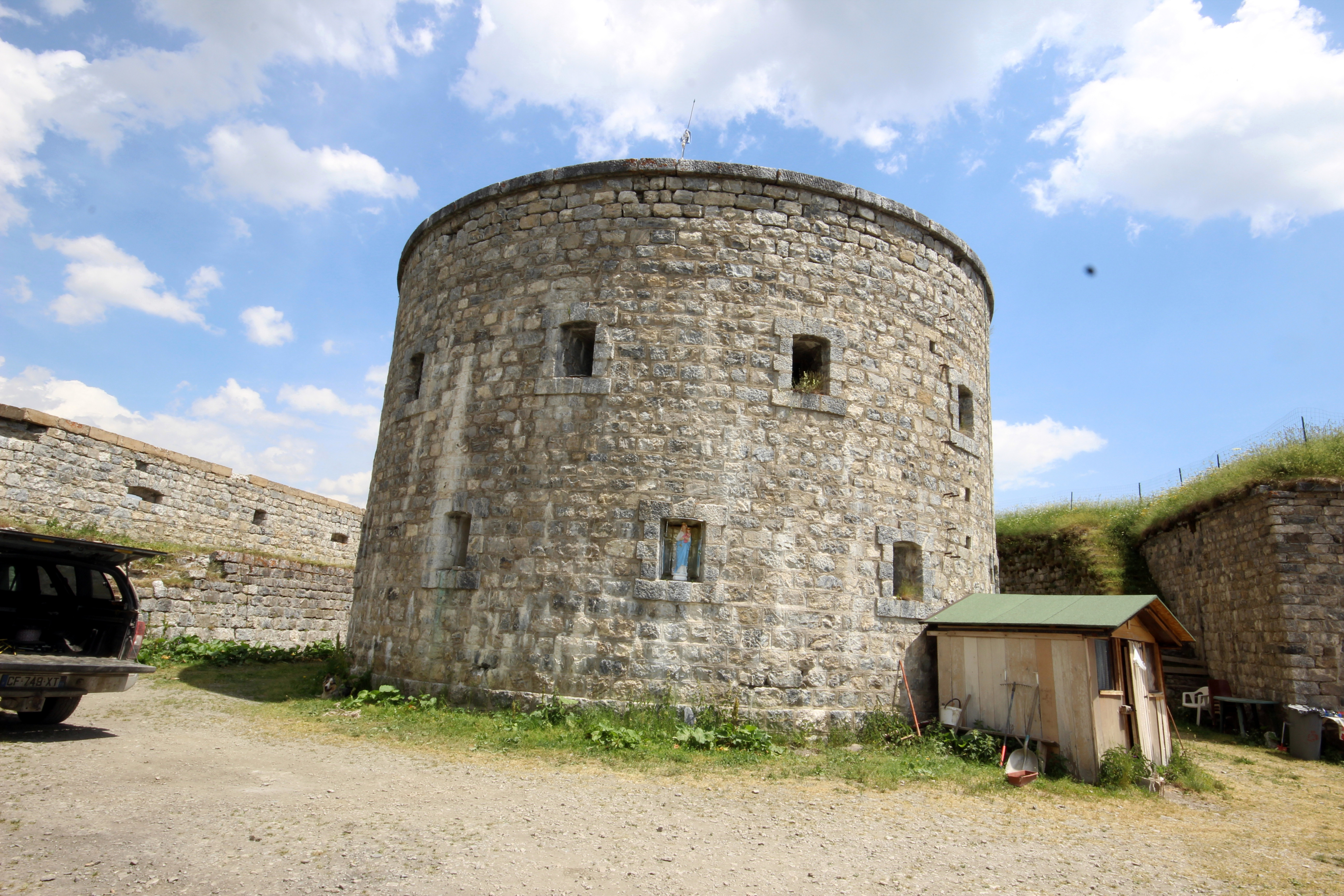 Le réduit du blockhaus de la Platte